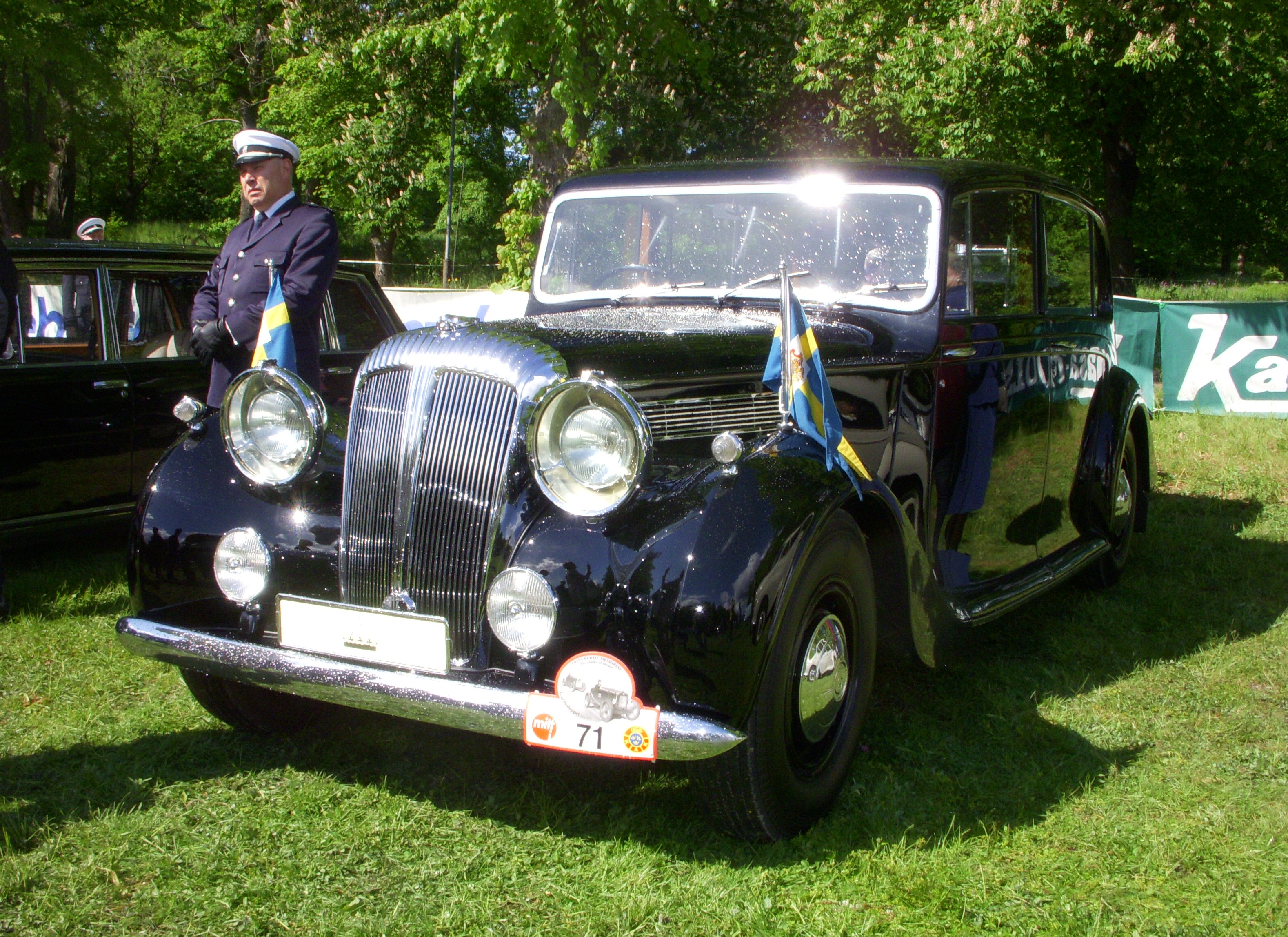 Gärdesloppet ”Prins Bertil Memorial”, Stockholm, maj 2011. Kungliga "Bröllopsbilen", en Daimler 27 HP, limousine årsmodell 1950. Hade 1951 reg.nr. "A1", är den älsta bilen i Hovstallet, användes bland annat vid kronprinsessabröllopet 2010-06-19.